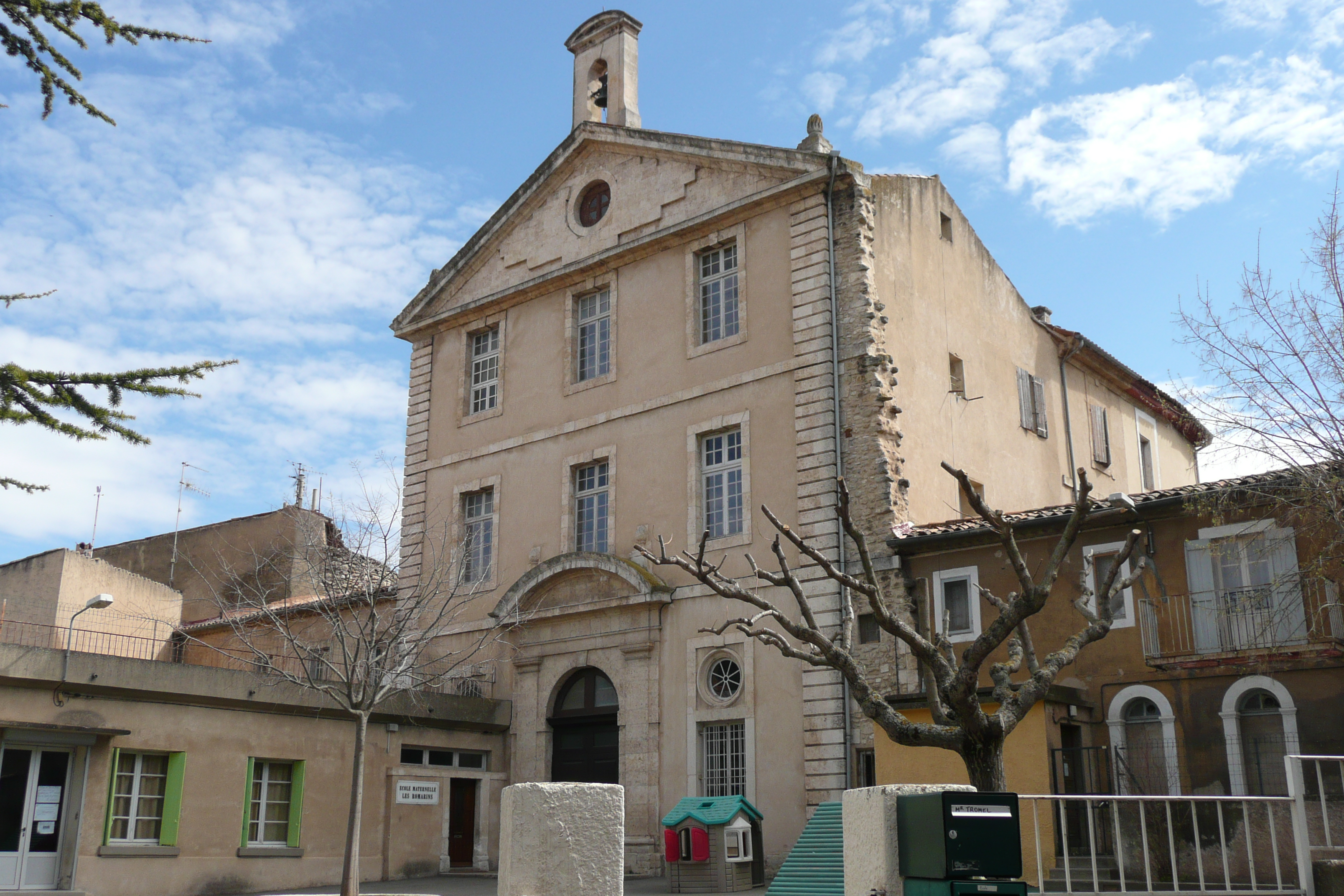 Ecole maternelle les Romarins à Apt.